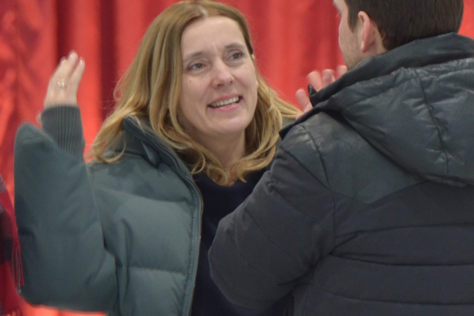 Alexandra Sell, Berlin Sportforum Hohenschönhausen